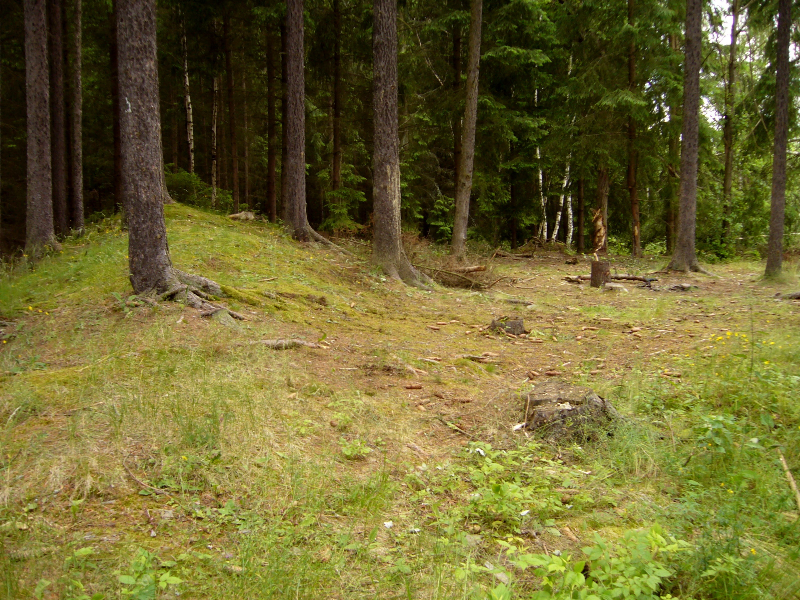 Hrad Falkenstein u Potína - předhradí s nevýrazným zbytkem valu